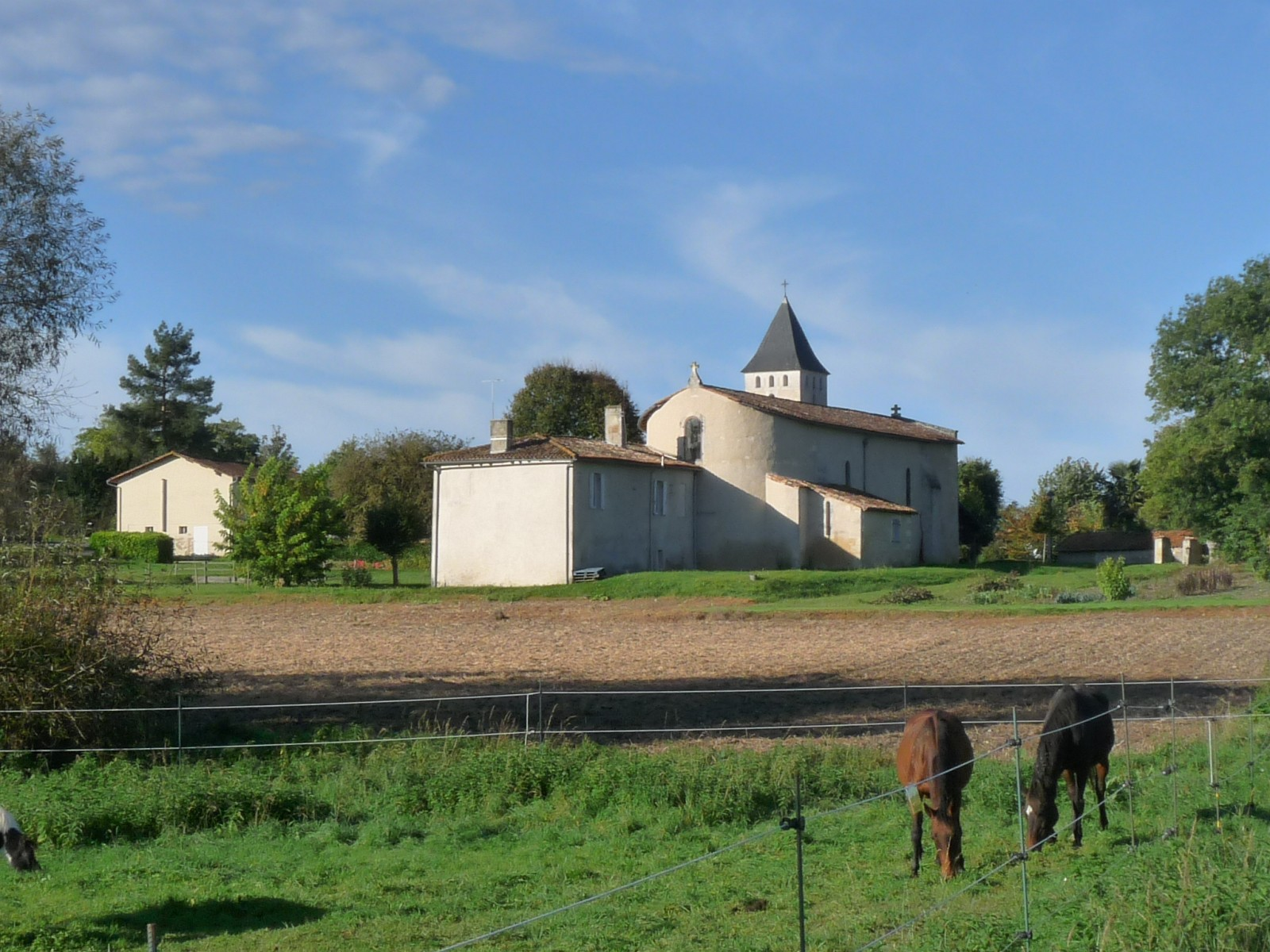 Vue du bourg et église de Vanzac, Charente-Maritime, France